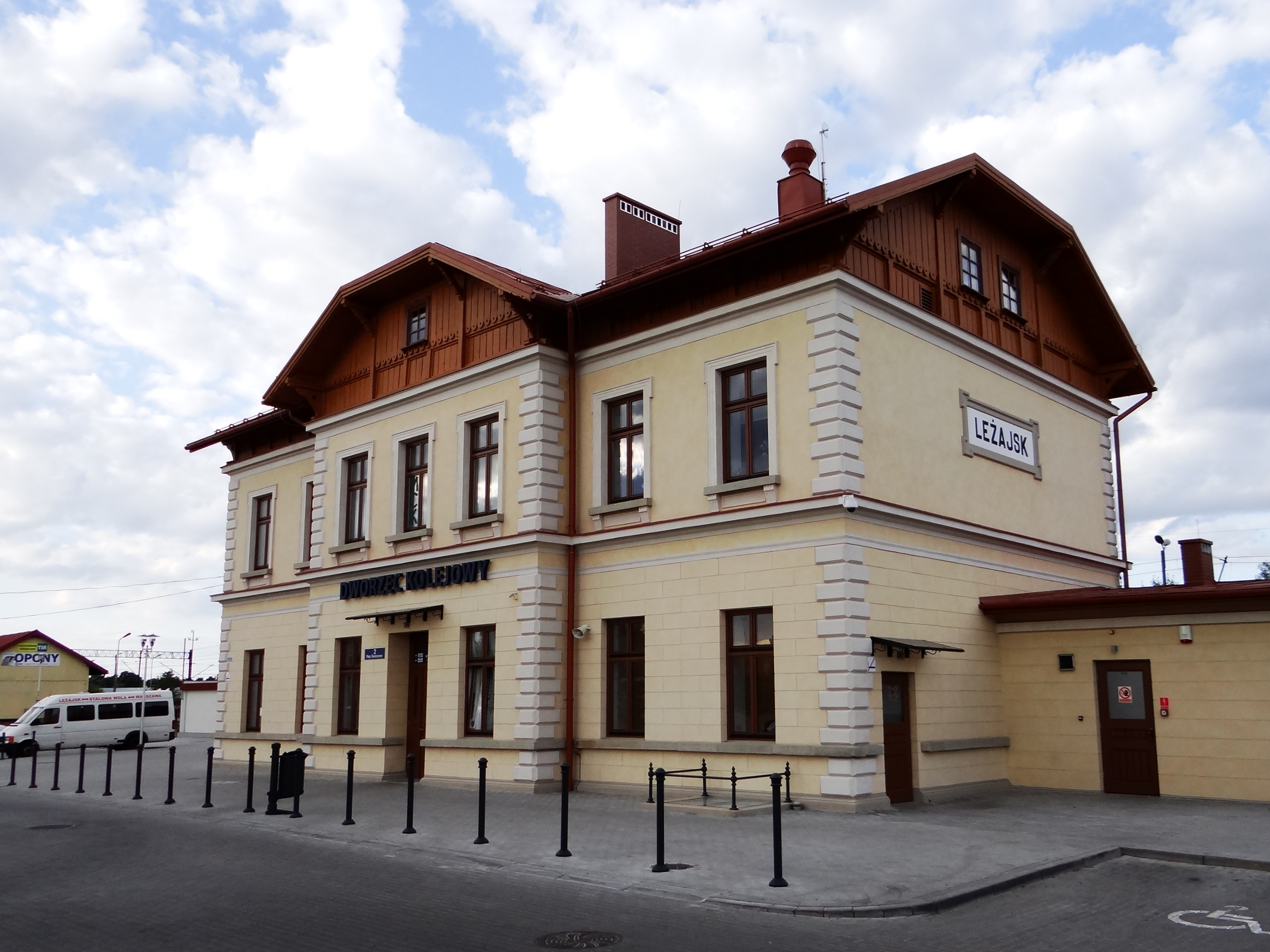 Budova nádraží ve městě Leźajsk, Polsko